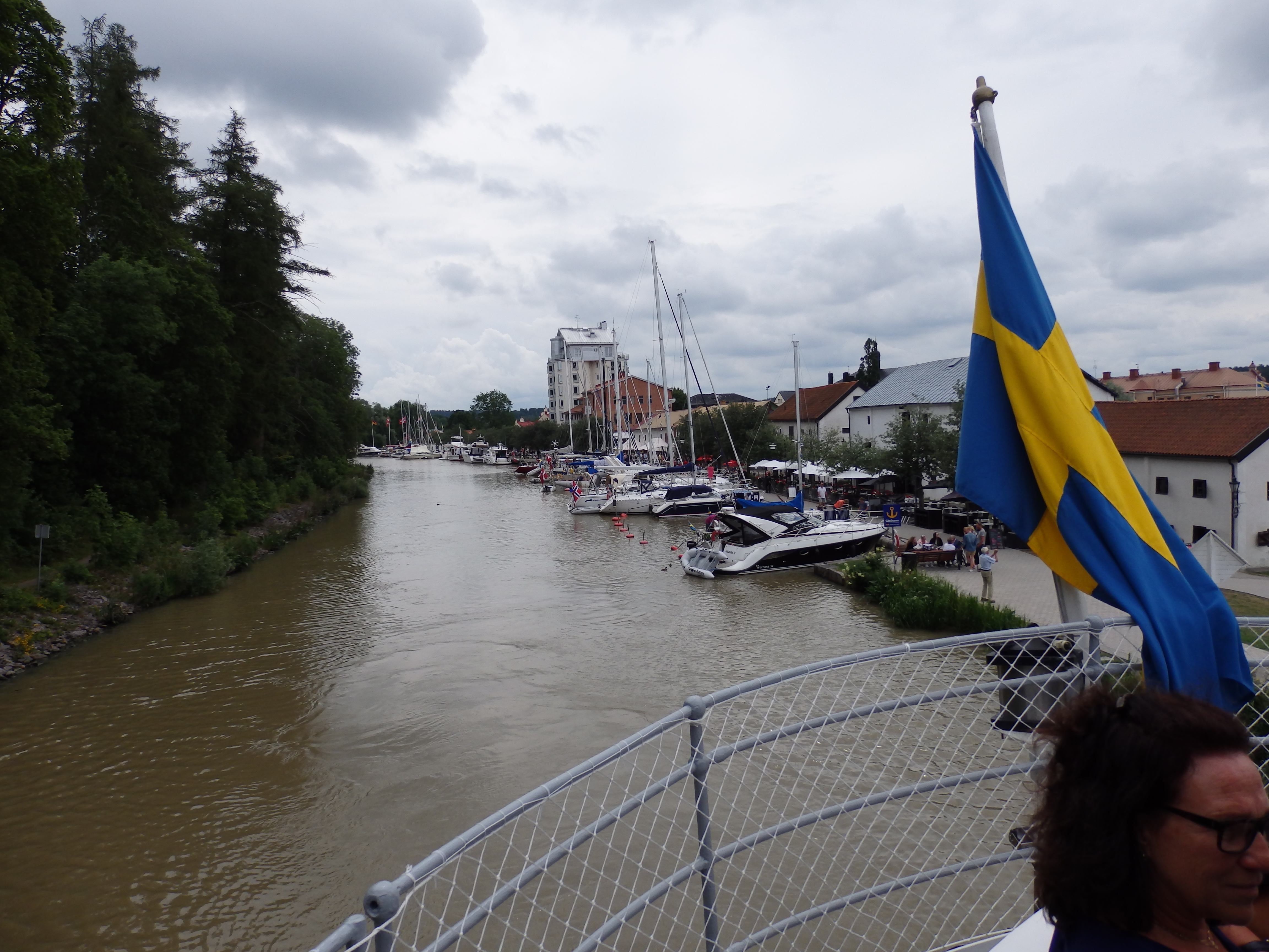 Göta Kanal ved Söderköping